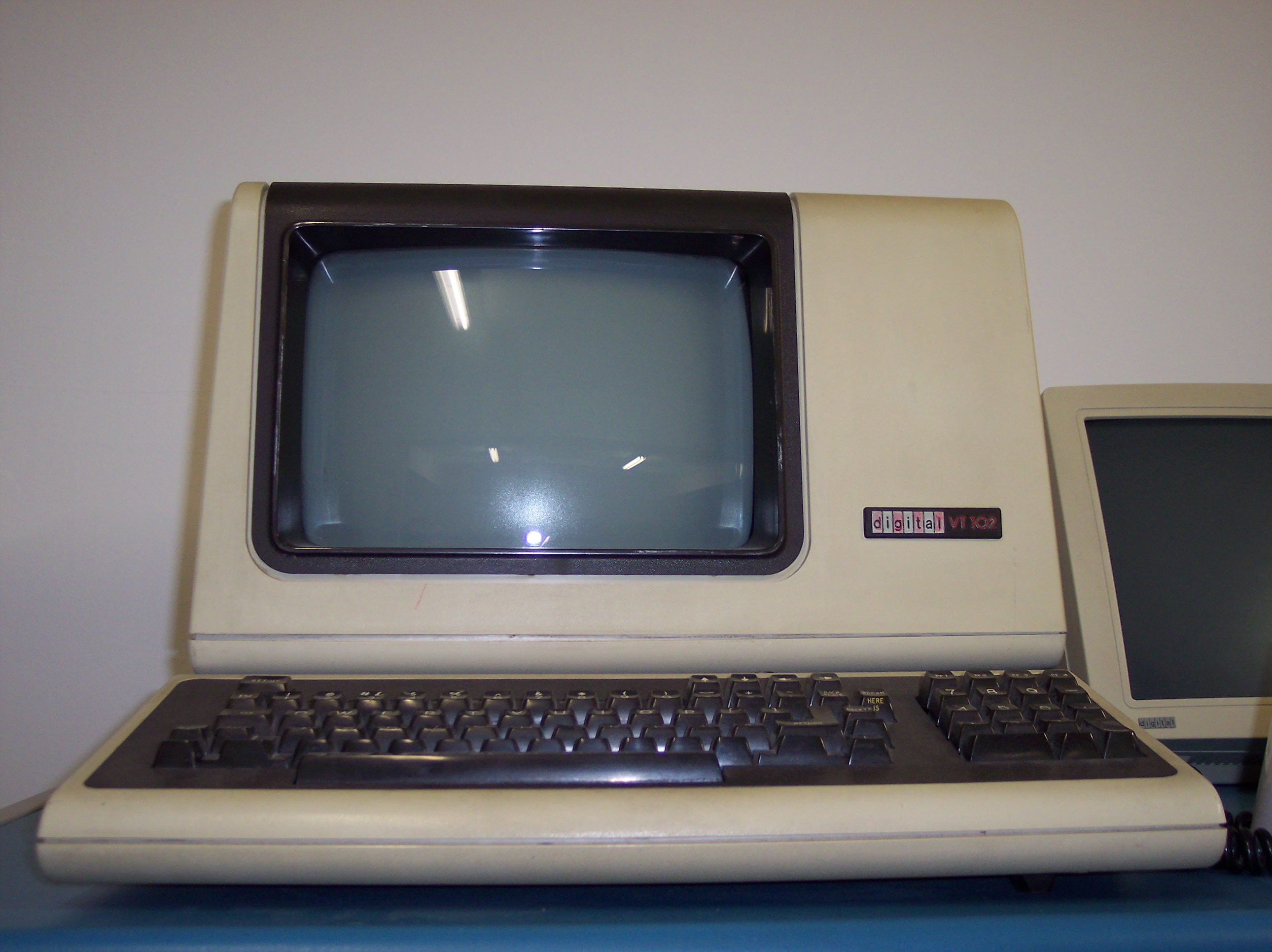 uno dei molteplici videoterminali per il VAX 11/780. Si ringrazia l'associazione Verdebinario per la disponibilità